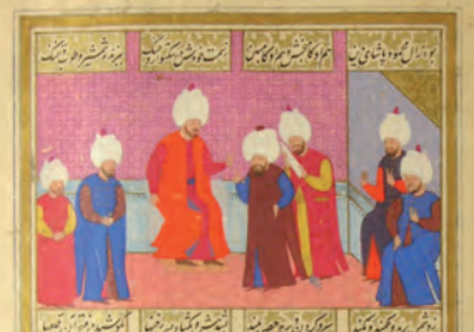 Şehnāme-i Selīm Hān, fol. 30a: Audience of Fifth Vizier Zal Mahmud Pasha